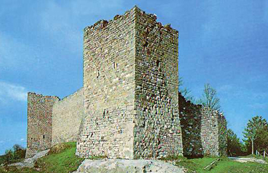 Torrioni delle antiche mura castellane di Montemonaco (Ascoli Piceno)